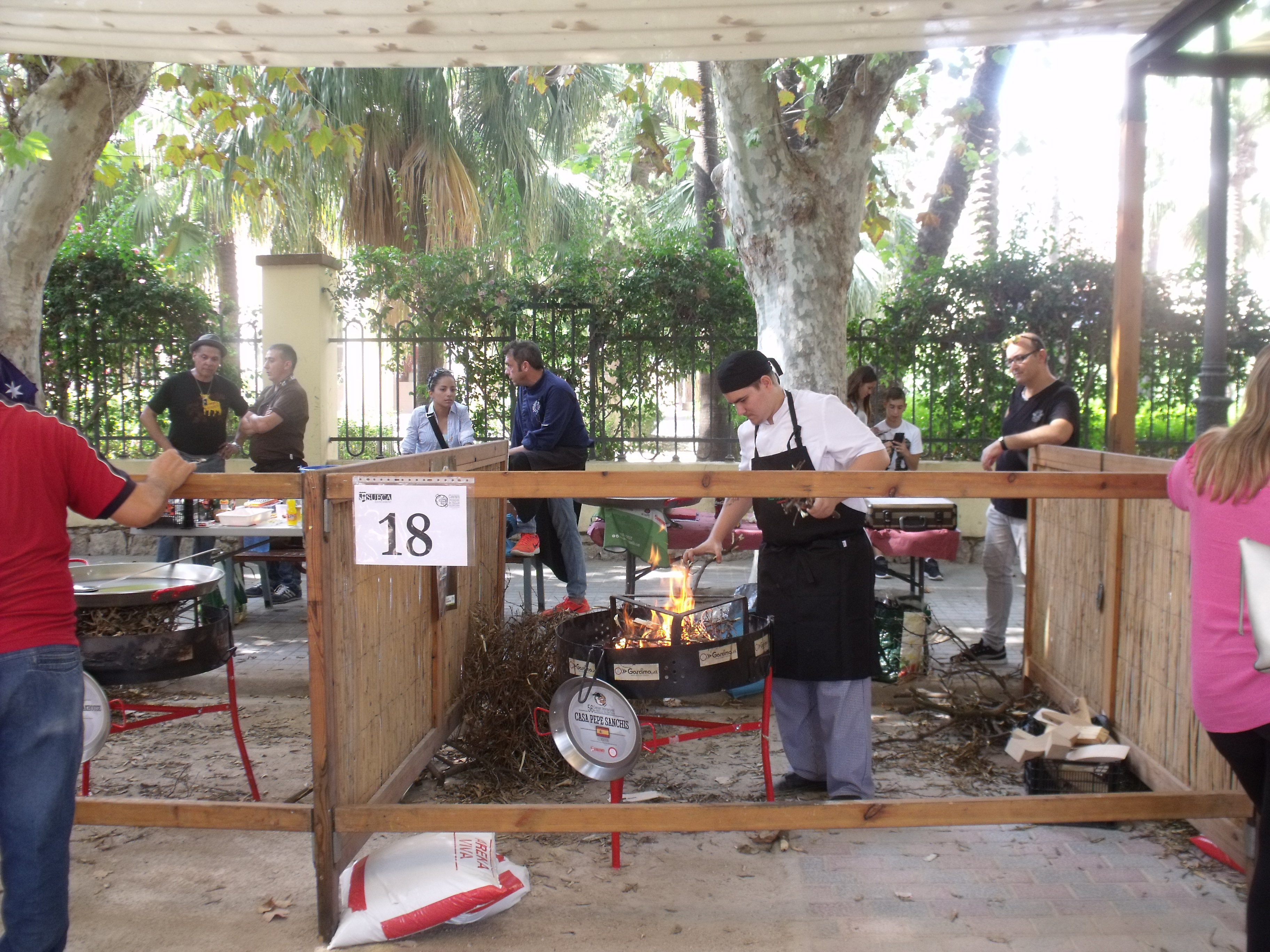 Diversas imágenes del 56 concurso internacional de paella Valenciana de Sueca